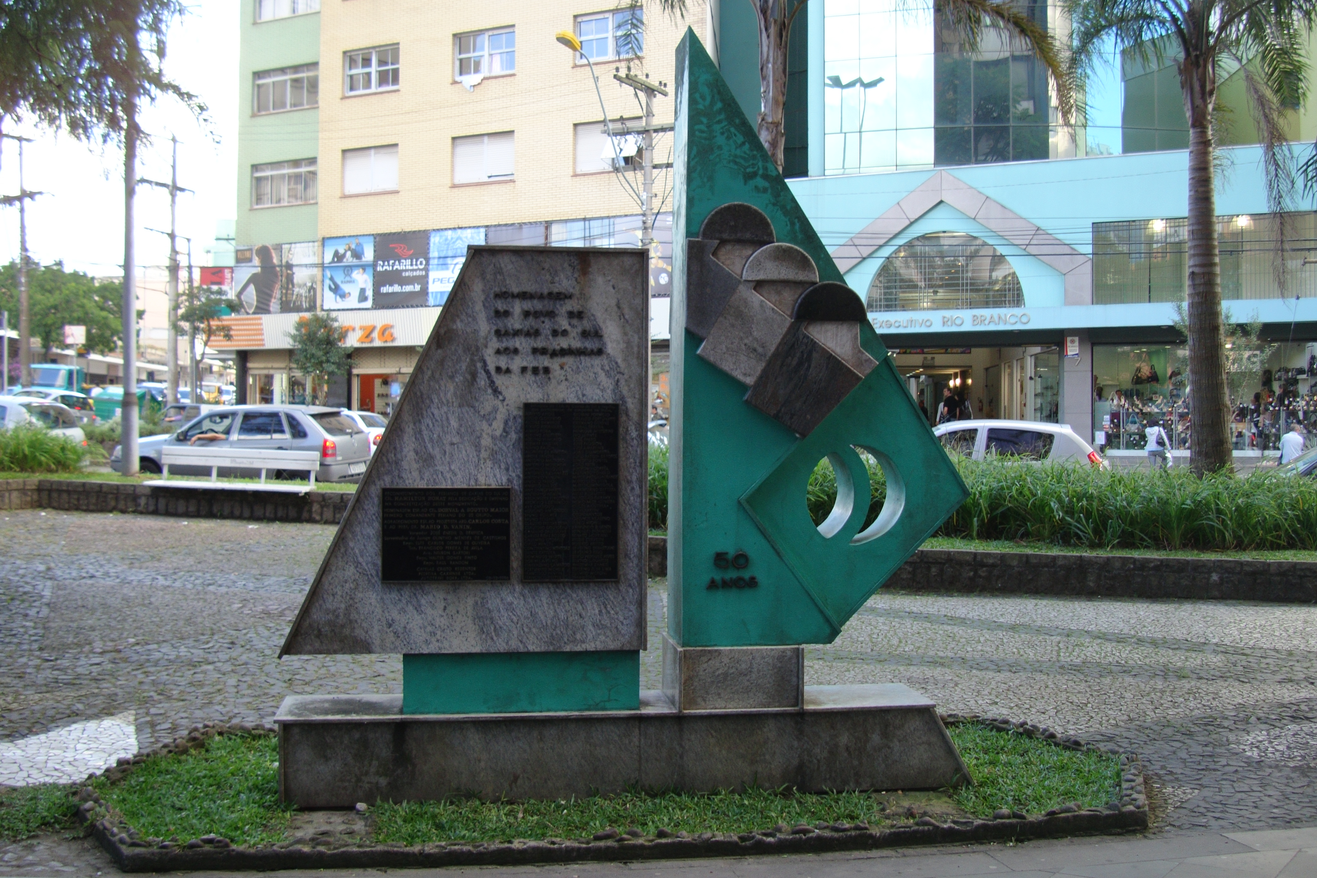 Monumento aos Pracinhas da FEB em Caxias do Sul (verso)